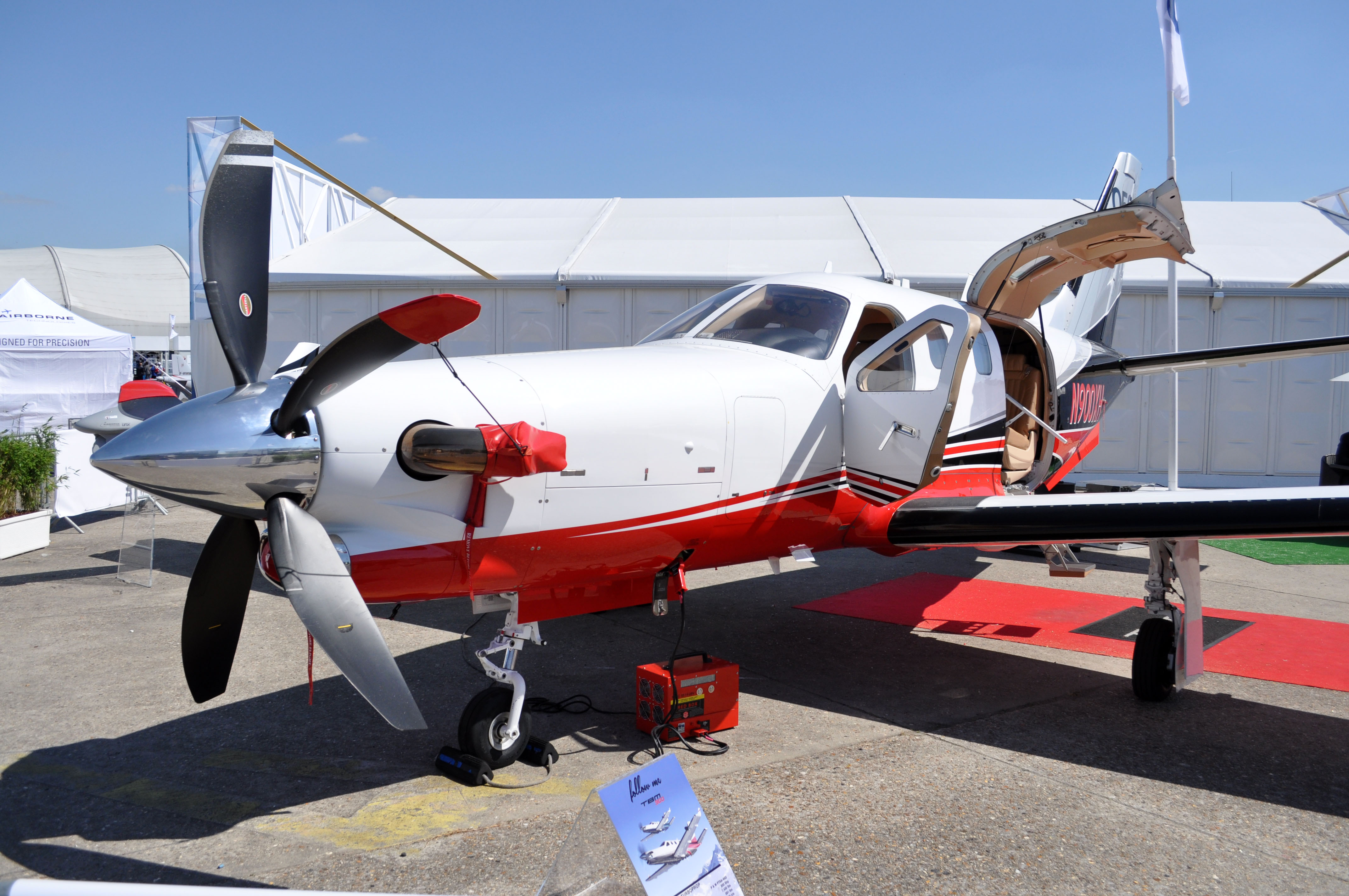 MSN 1019 Socata TBM-900 LBG AIRPORT SIAE 2015